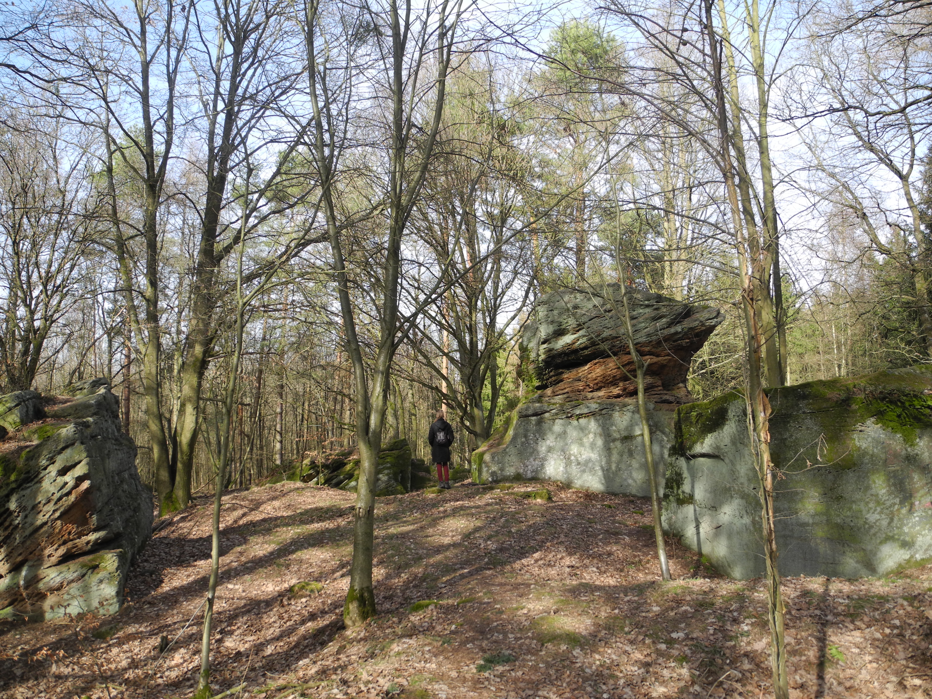 Flächenhaftes Naturdenkmal im Landkreis Kassel 6.33.875. Bergkuppe „Rauenstein“ mit zerklüfteten Buntsandstein-Felsen südlich von Wolfhagen.